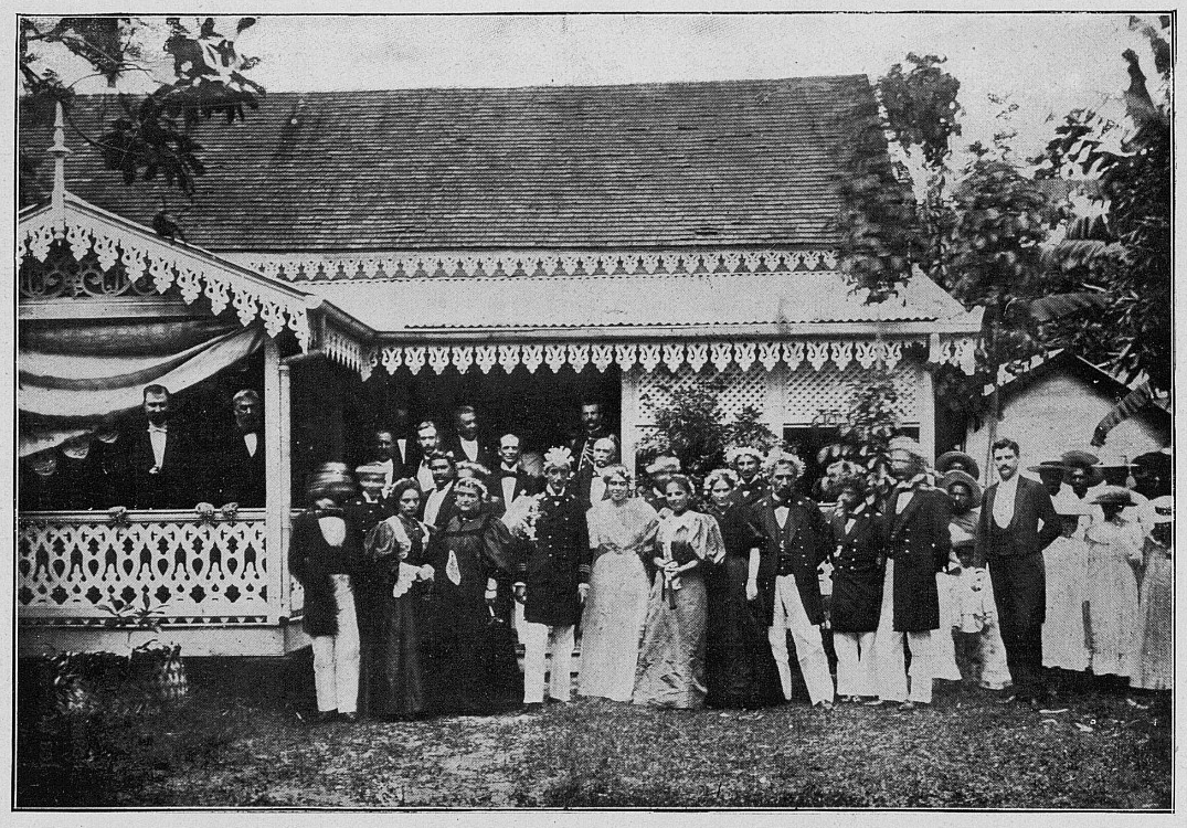 Prince Louis de Savoie, Papeete, december 26th, 1895.